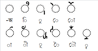 এলাহাবাদ স্তম্ভে ব্যবহৃত গুপ্ত ব্রাহ্মী লিপির স্বরবর্ণসমূহের গৌণ রূপ (স্বরমাত্রাগুলি)-এর সাথে বাংলা স্বরমাত্রাগুলির একটি তুলনা